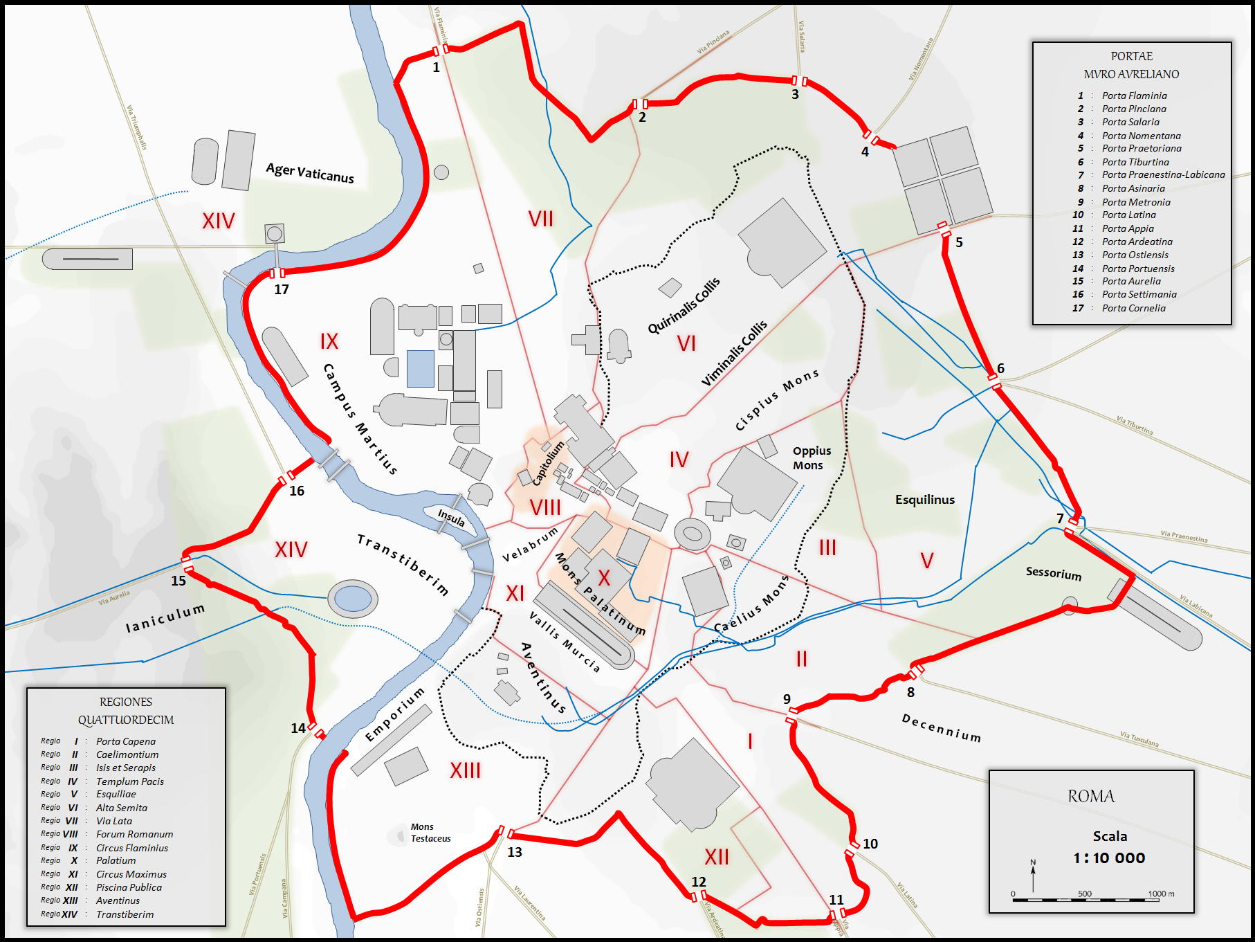 Le mur d'Aurélien sur le plan de la Rome antique